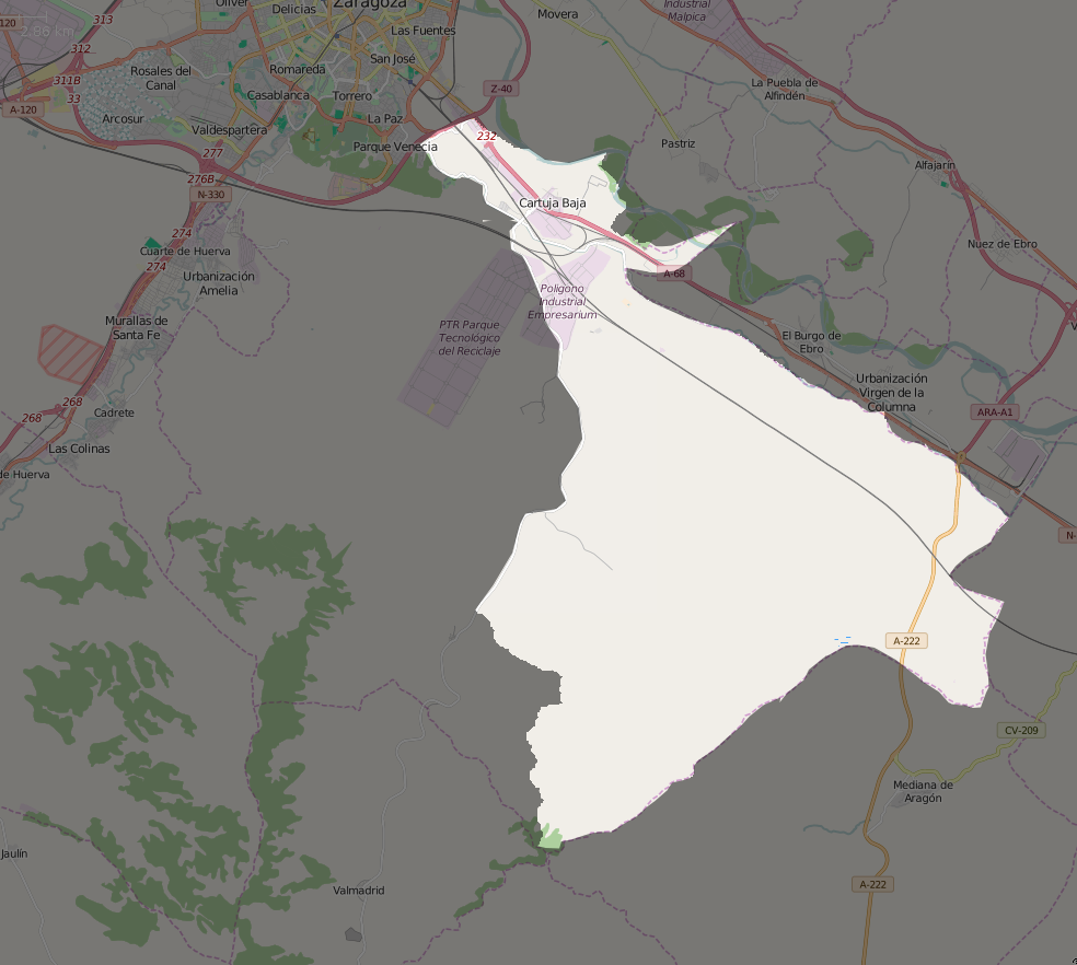 Mapa del distrito de La Cartuja Baja en Zaragoza.